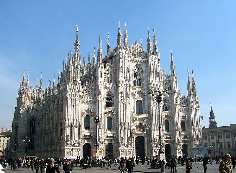 Milano - Duomo